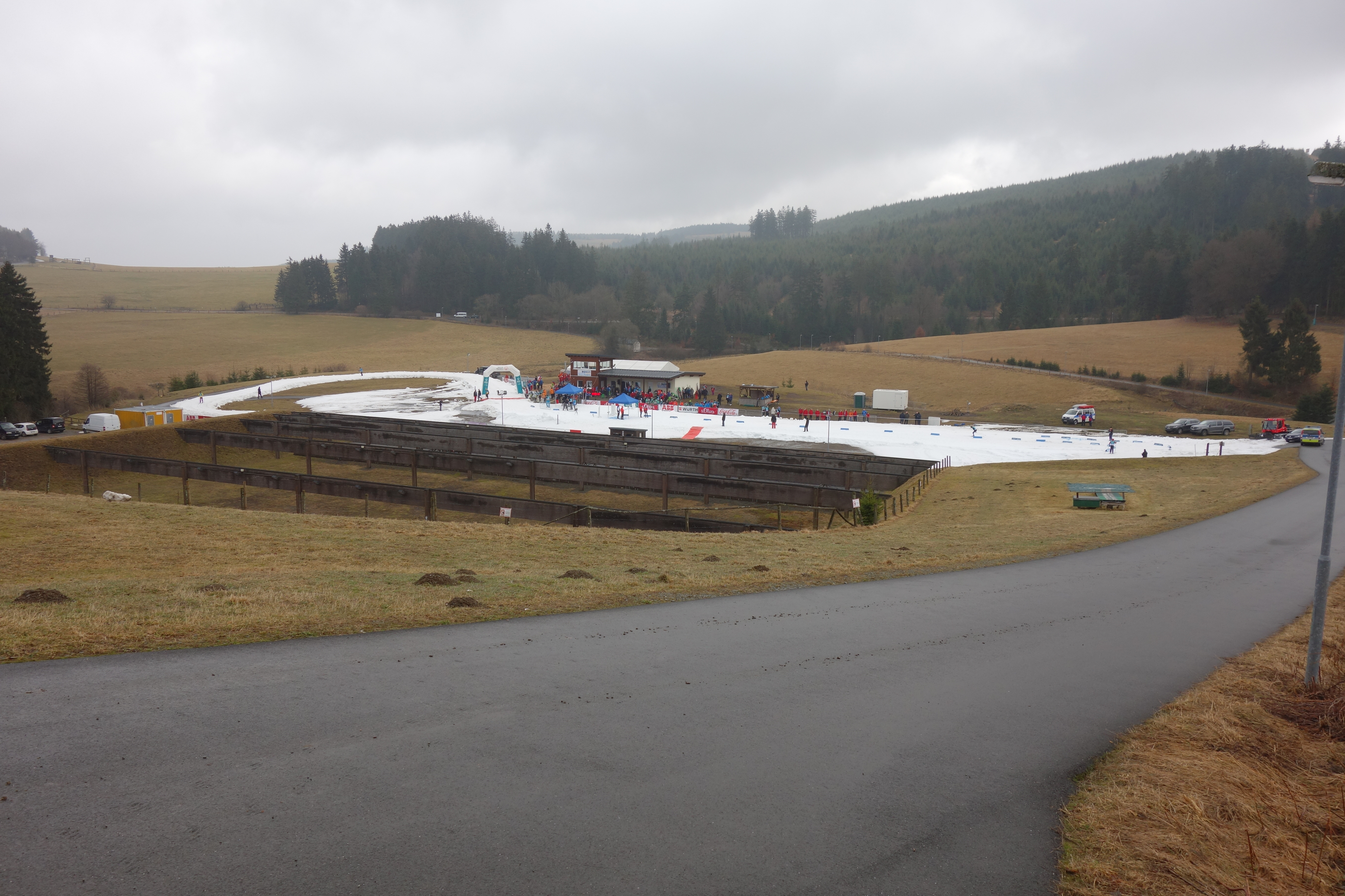 EWF-Biathlon-Arena beim Langlauf-Wettbewerb bei Special Olympics 2017 Willingen.